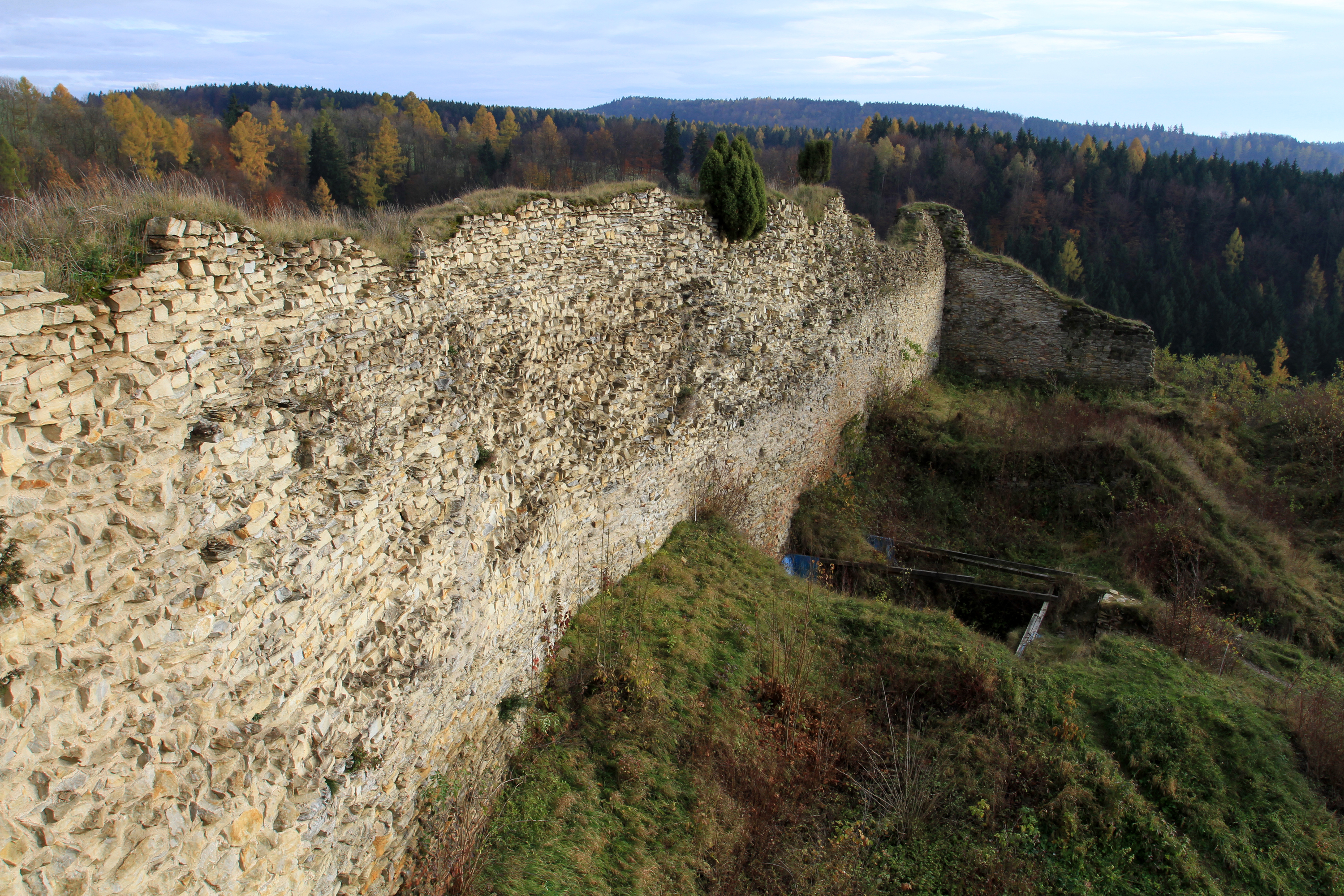 Hrad, zřícenina (Lanšperk), Lanšperk